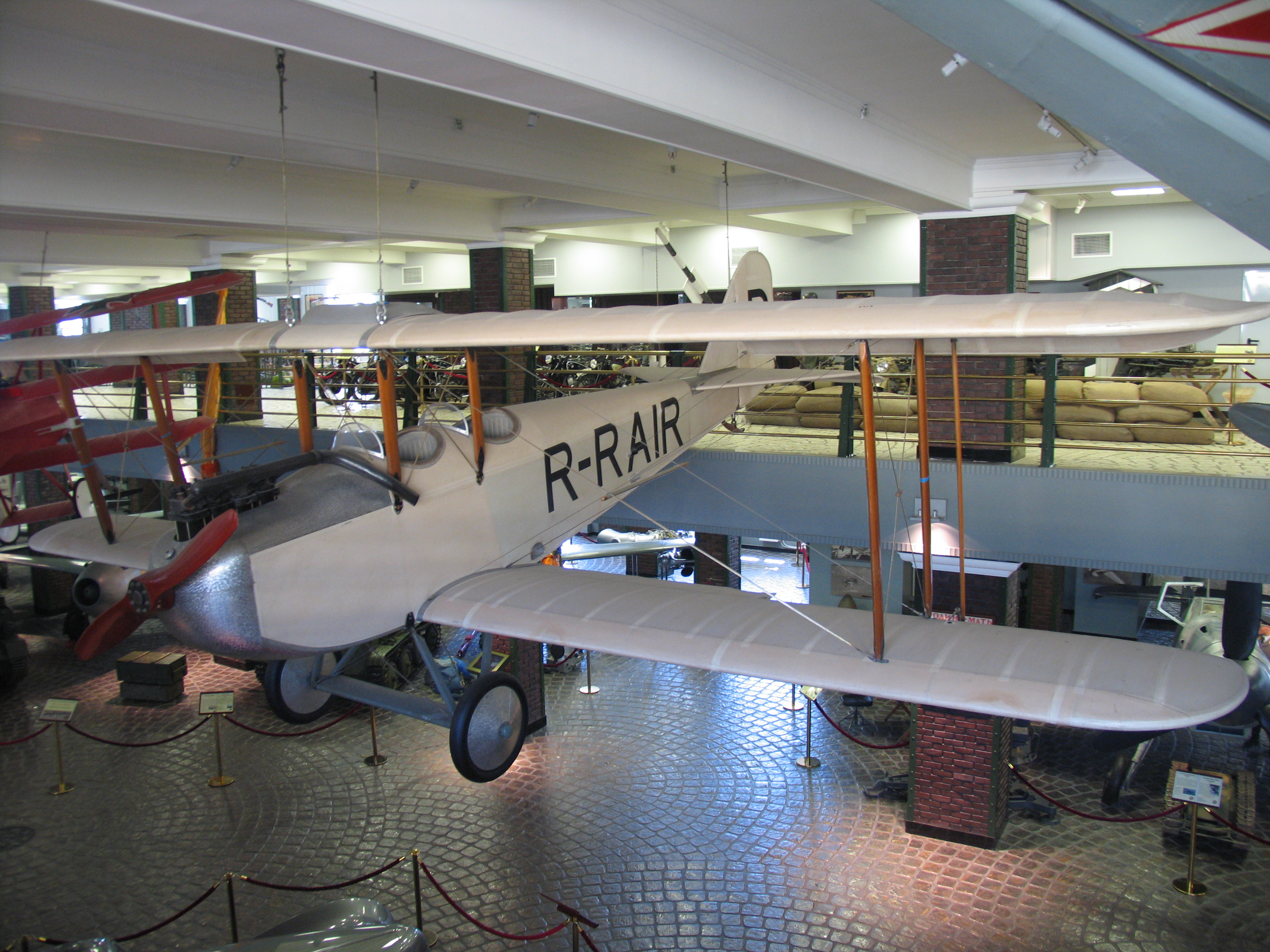 АИР-1 в Музее техники Задорожного.